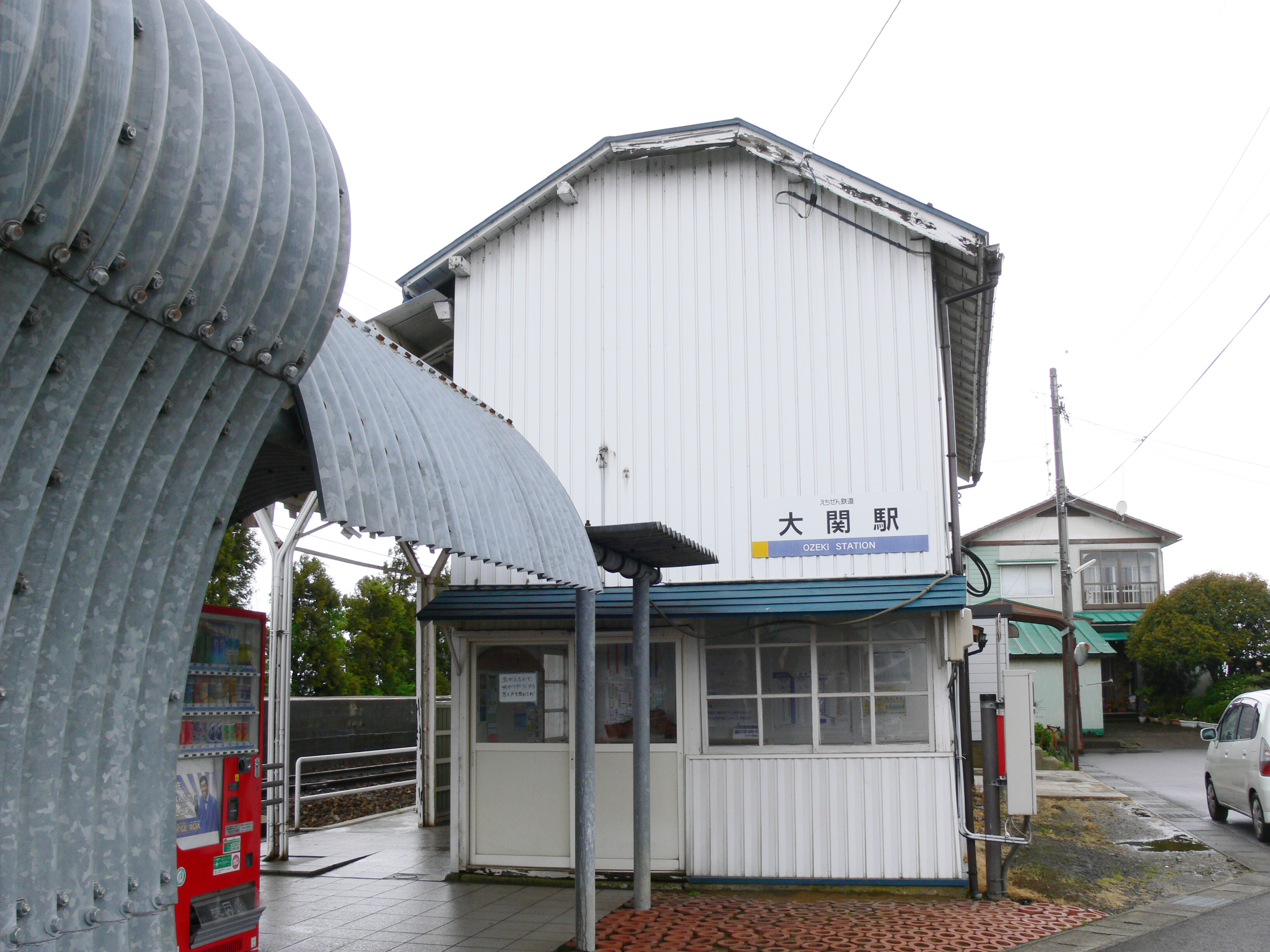 Ozeki Station 大関駅 駅舎